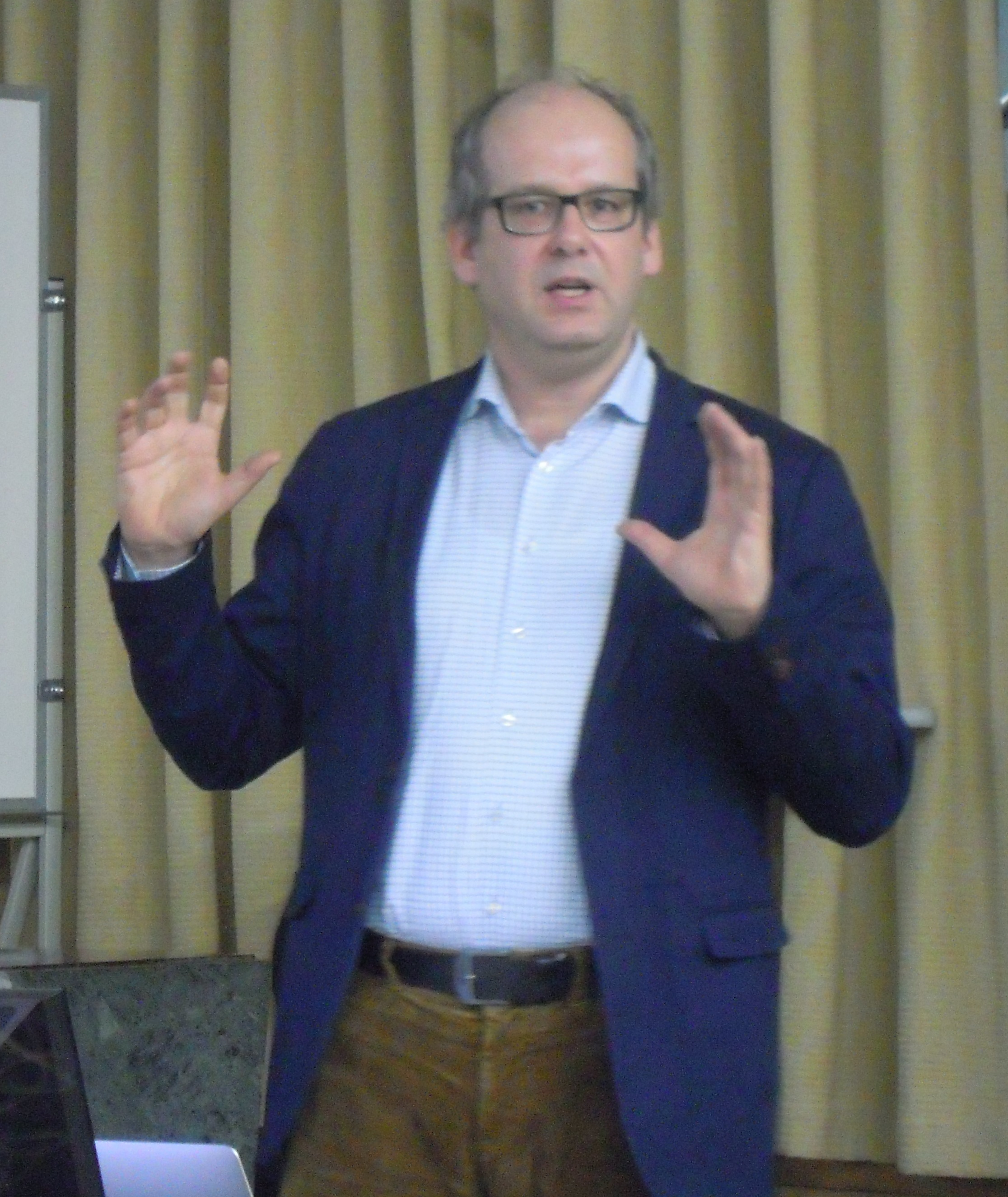 Johannes Kabatek no Simposio Cambio lingüístico no galego actual, organizado polo Instituto da Lingua Galega na Facultade de Filoloxía de Santiago de Compostela